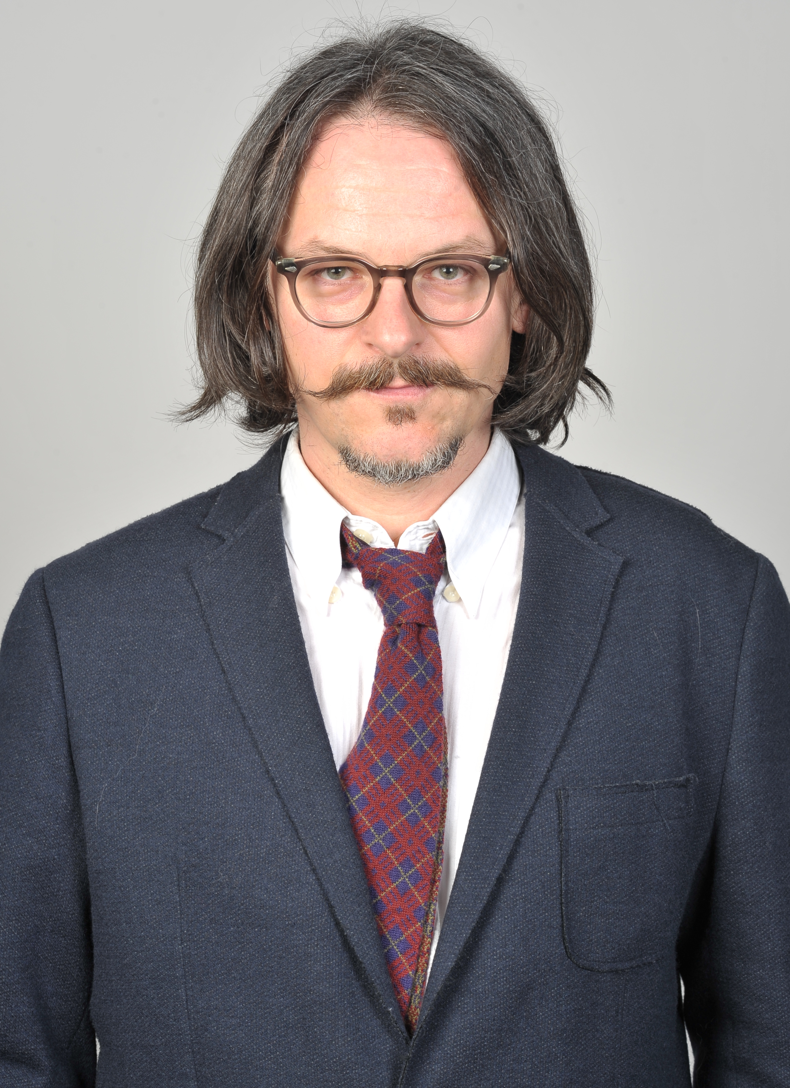 Der österreichische Musiker Marcus Nigsch (Marque; Künstlerhaus, Wien, Österreich)